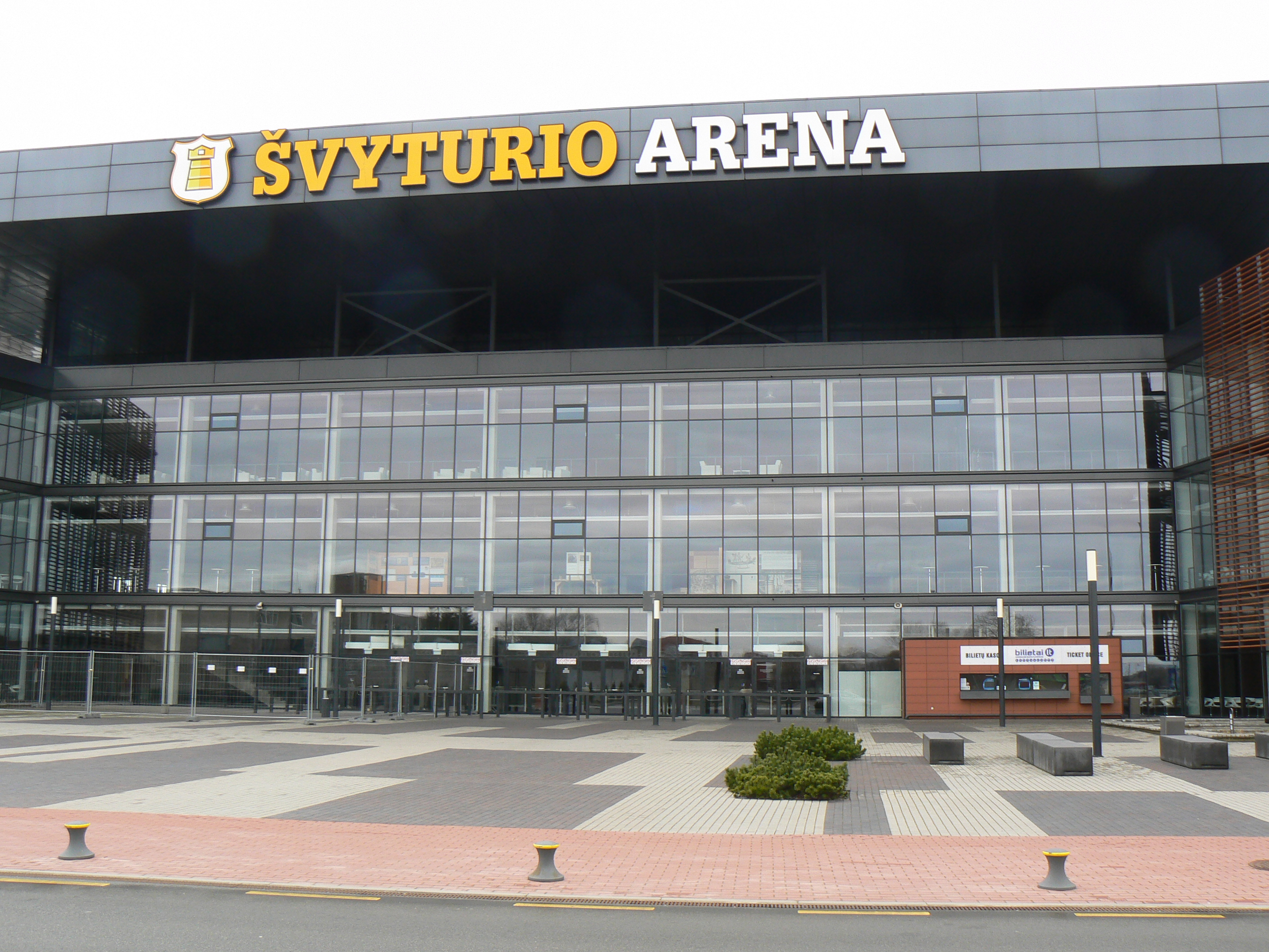 Švyturio Arena je sportovní hala s krytým hřištěm v Klaipėdě